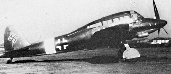 Savoia Marchetti SM.93 bombardiere in picchiata